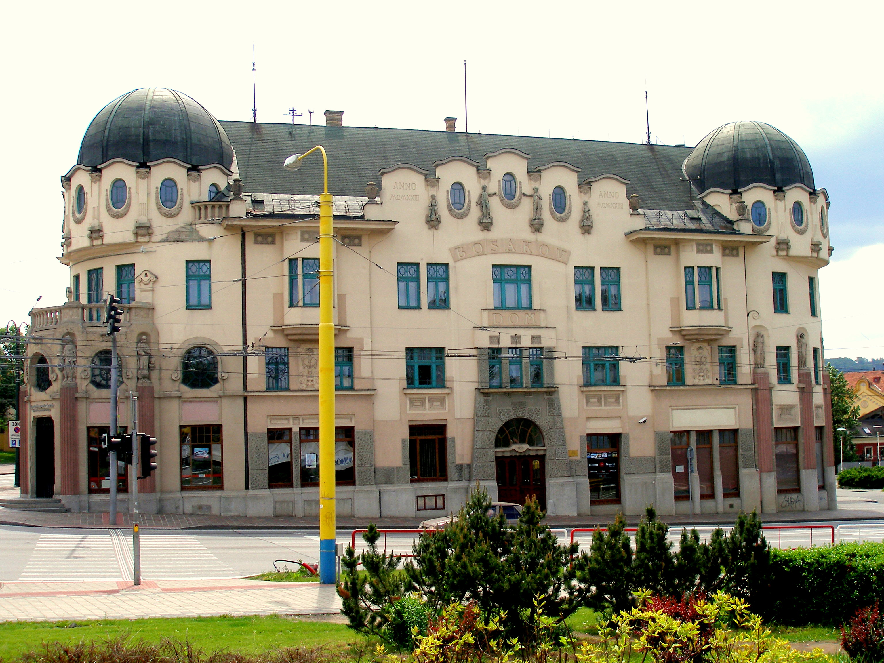 Bosákov dom. Mesto Prešov, ulica Levočská